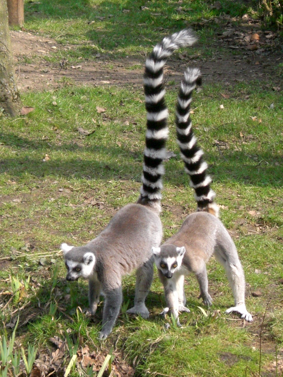 Zwee Kattaen